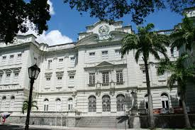 Paço Municipal, em João Pessoa, antigament conhecido como casa do Erario, ja foi sede da prefeitura municipal e sede dos Correios